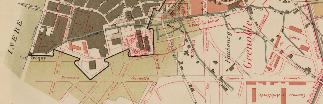 Extrait plan du Boulevard Gambetta à Grenoble; plan de 1815 superposé à celui de 1887.